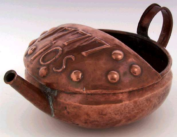 Trøys av kobber datert 1777 fra Fåberg i Oppland. Norsk Folkemuseum NF.1897-0185